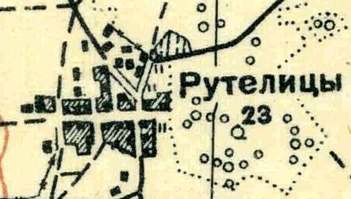 Топографическая карта Ленинградской области, квадрат О-35-24-А-а (Клясина), деревня Рутелицы